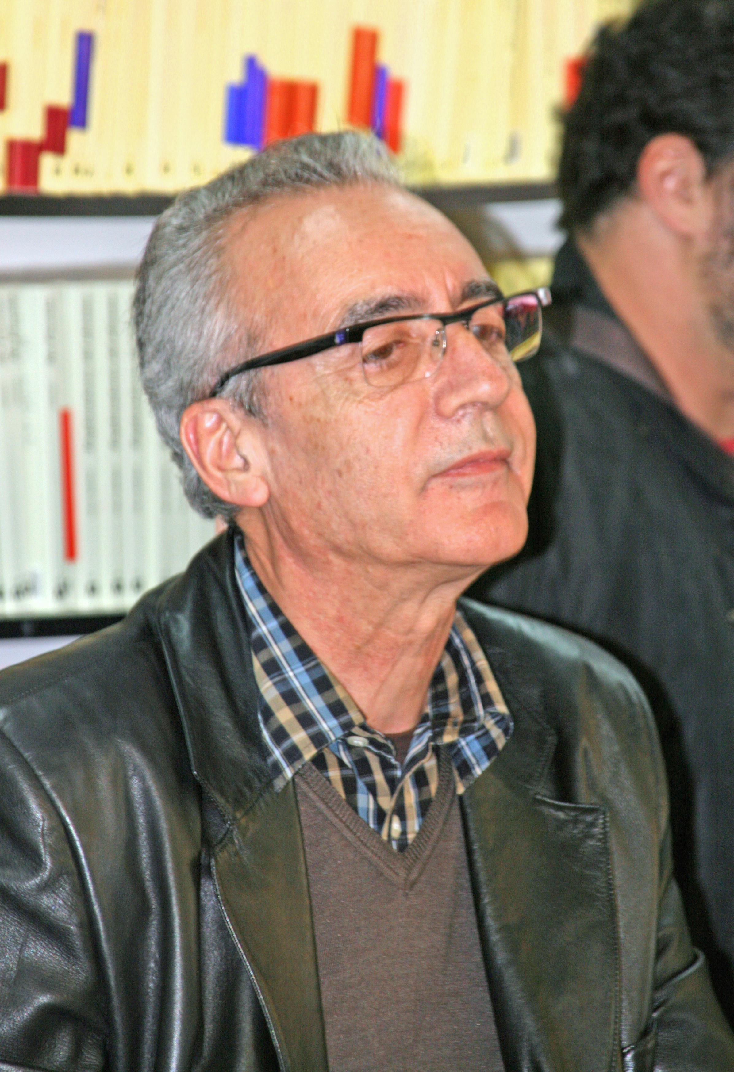 Juan José Millás en la Feria del Libro de Madrid, 31 de mayo de 2008.